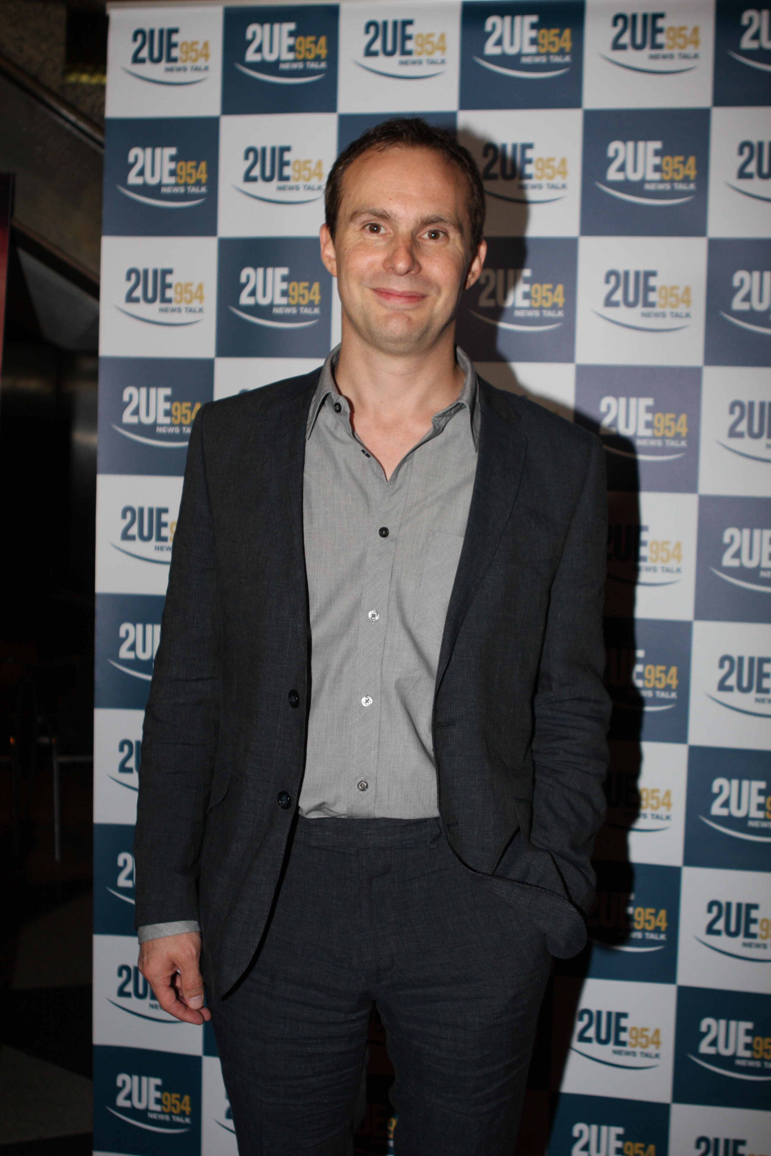 Jim Loach - Oranges and Sunshine Premiere Sydney